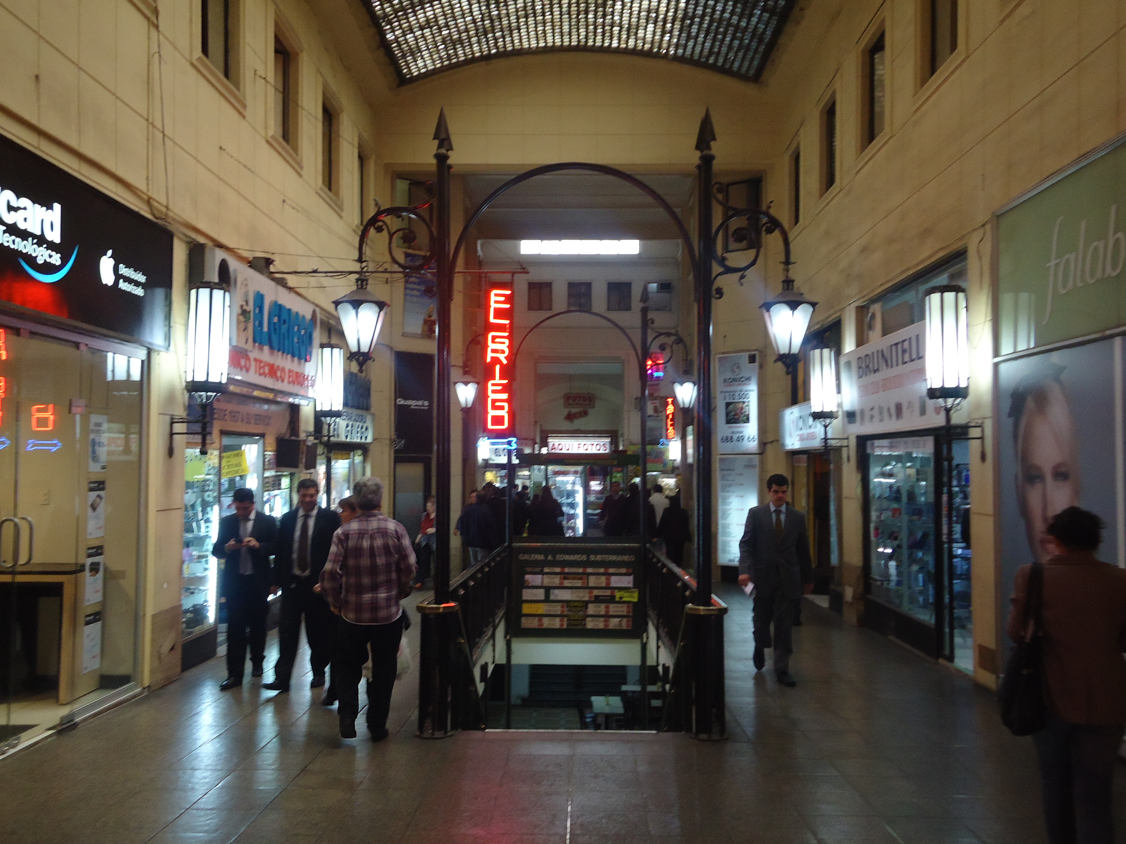 Galería Edwards, Santiago, Chile